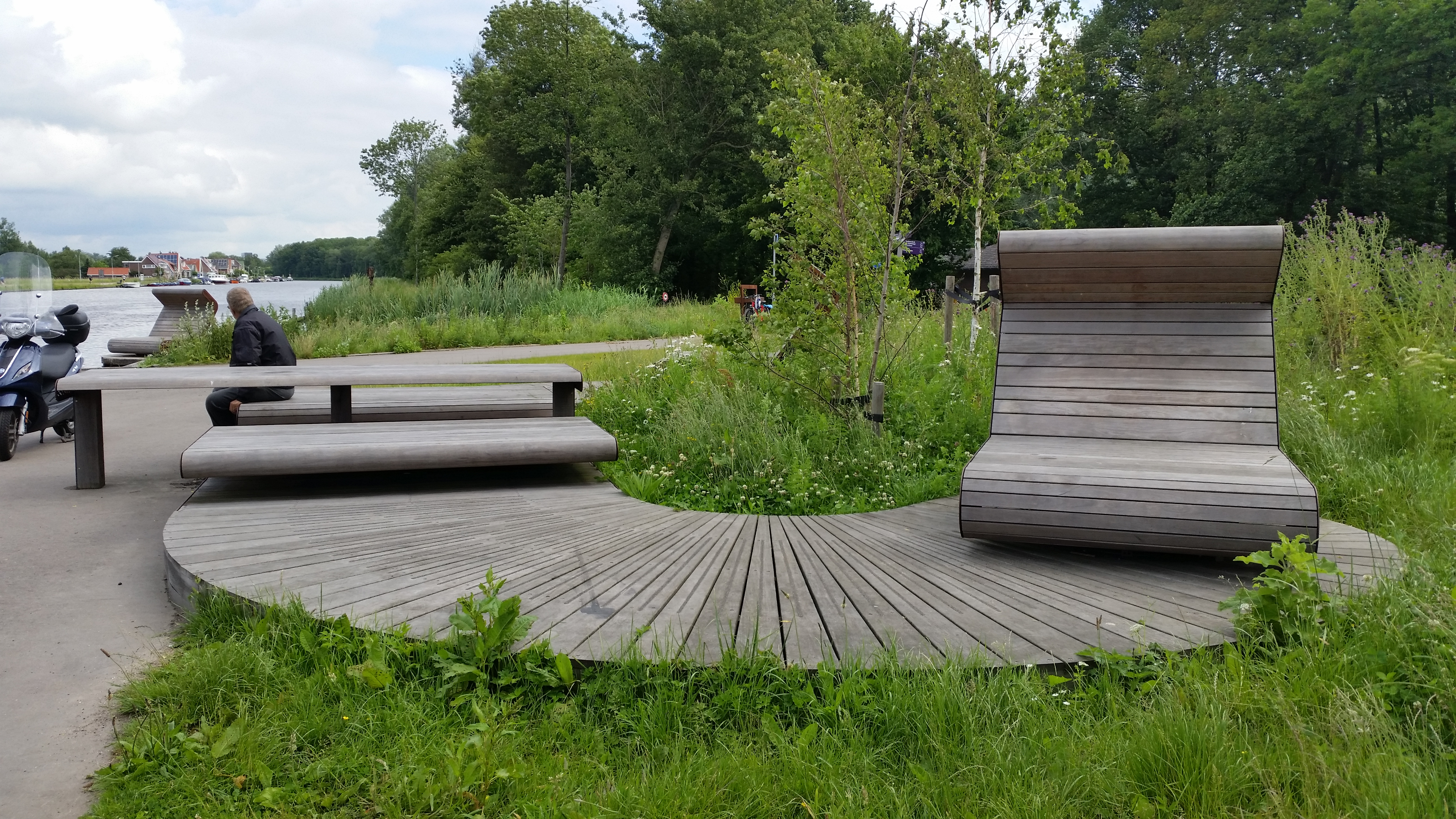 Lord of the rings (Buitenom), meubilair